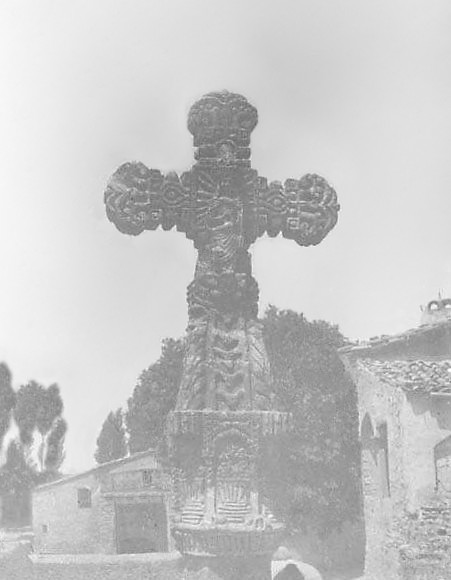 Imatge